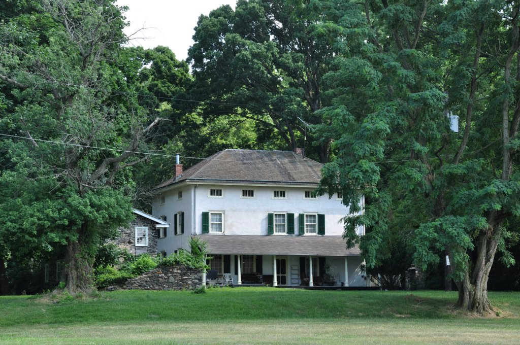 Growden Mansion in Bensalem, Pennsylvania.